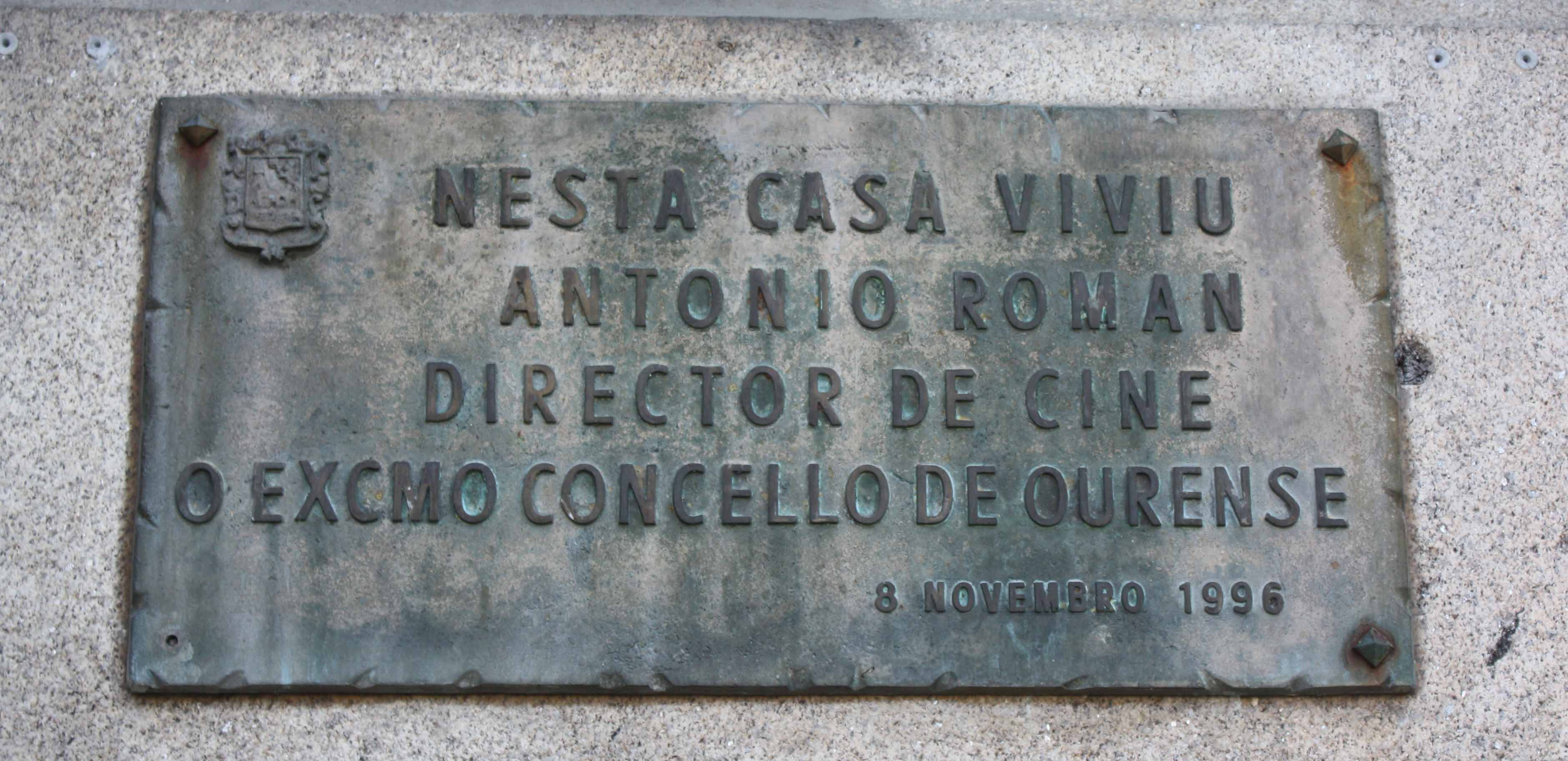 Placa na que viviu o director de cine Antonio Román, nos xardíns do Bispo Cesáreo, en Ourense.